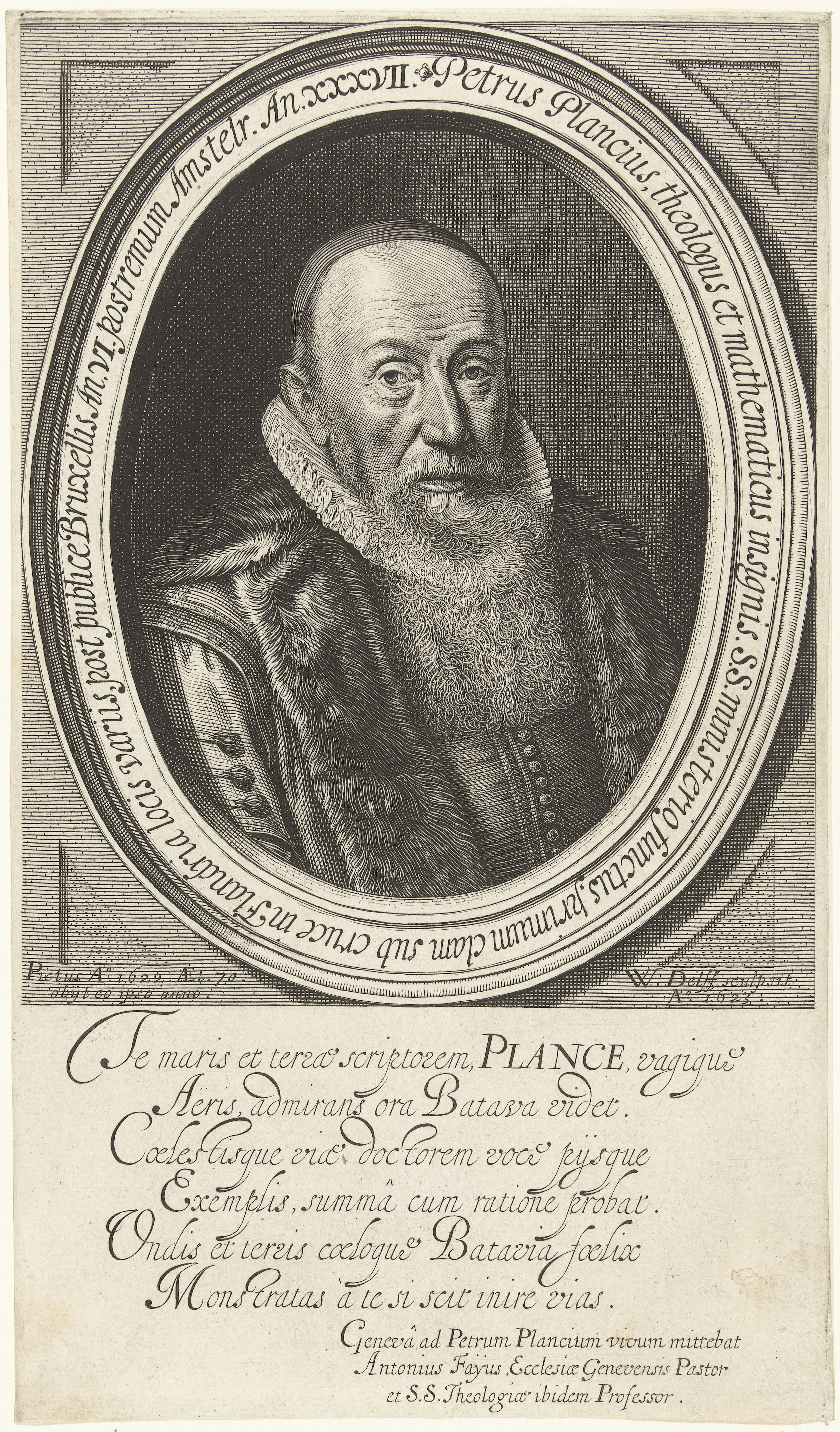 IdentificatieTitel(s): Portret van Petrus Plancius op 70-jarige leeftijdObjecttype: prent Objectnummer: RP-P-BI-6903Catalogusreferentie: Hollstein Dutch 71Opschriften / Merken: verzamelaarsmerk, verso, gestempeld: Lugt 2228Omschrijving: Portret van geograaf en theoloog Petrus Plancius op 70-jarige, borststuk met baard en toga in ovale omlijsting met Latijns opschrift. In ondermarge Latijns vers in zes regels.VervaardigingVervaardiger: prentmaker: Willem Jacobsz. Delff (vermeld op object)schrijver: Antonius Fayus (vermeld op object)Plaats vervaardiging: DelftDatering: 1623Fysieke kenmerken: gravureMateriaal: papier Techniek: graveren (drukprocedé)Afmetingen: blad: h 239 mm × b 139 mmOnderwerpWat: theologianWie: Petrus PlanciusVerwerving en rechtenVerwerving: onbekendCopyright: Publiek domein